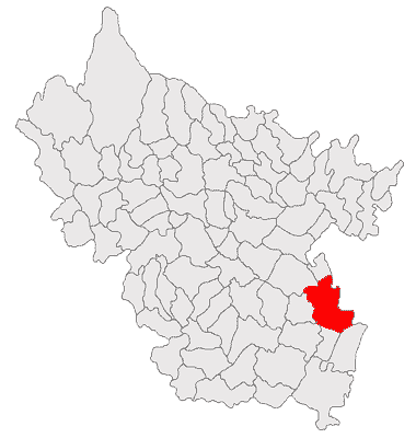 Categorie:Hărţi ale judeţului Buzău